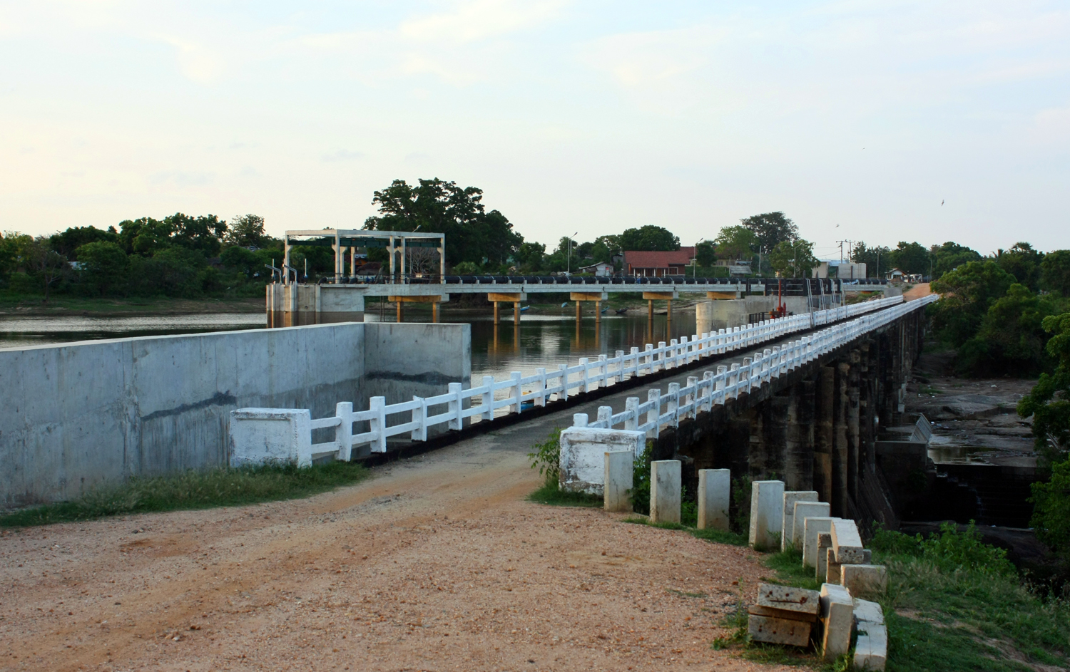 Unnichchai Tank view